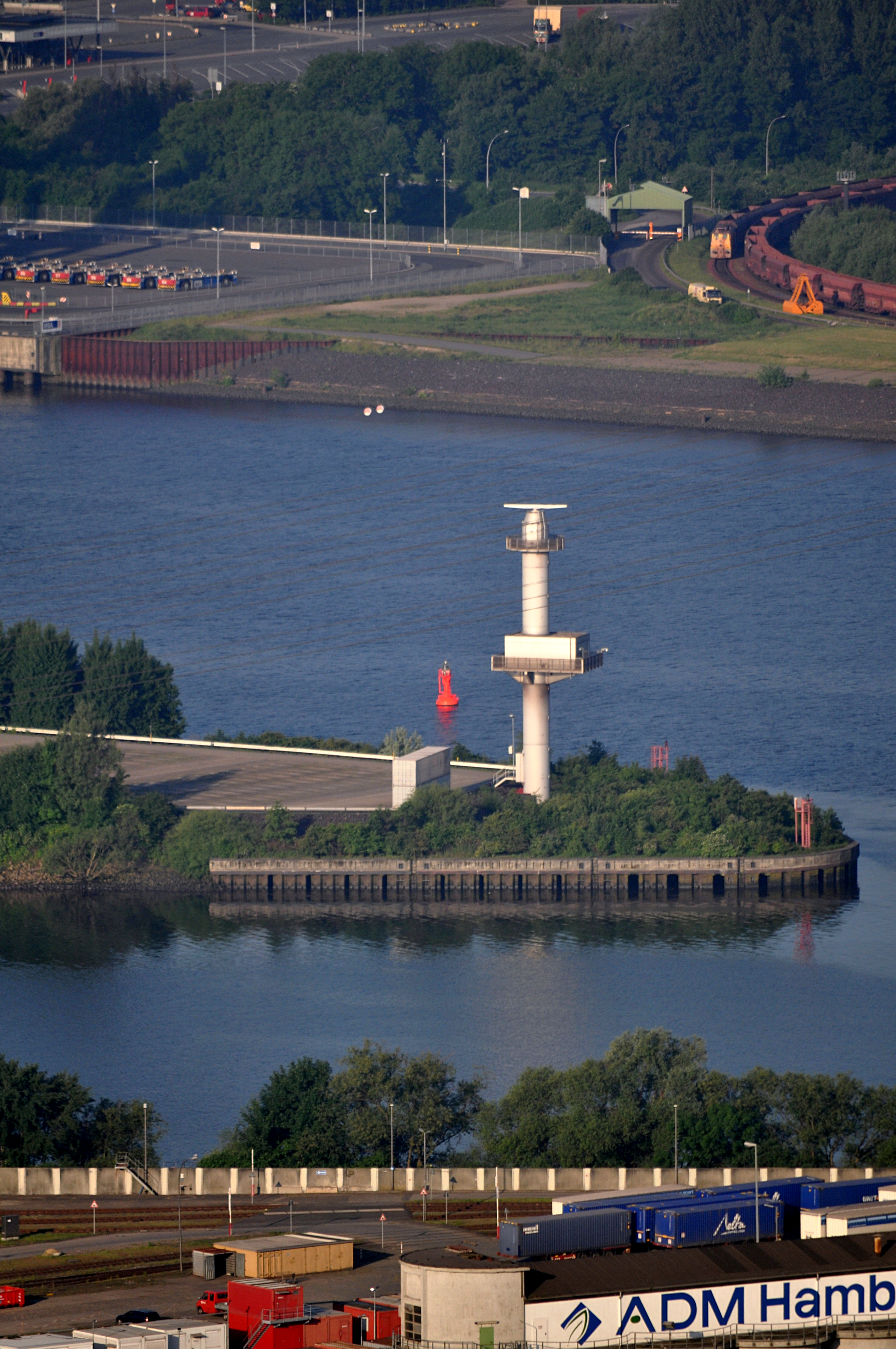 Radarturm Krusenbusch auf der Kattwyk-Halbinsel in Hamburg-Wilhelmsburg, im Vordergrund die Mündung der Rethe in den Kölbrand.